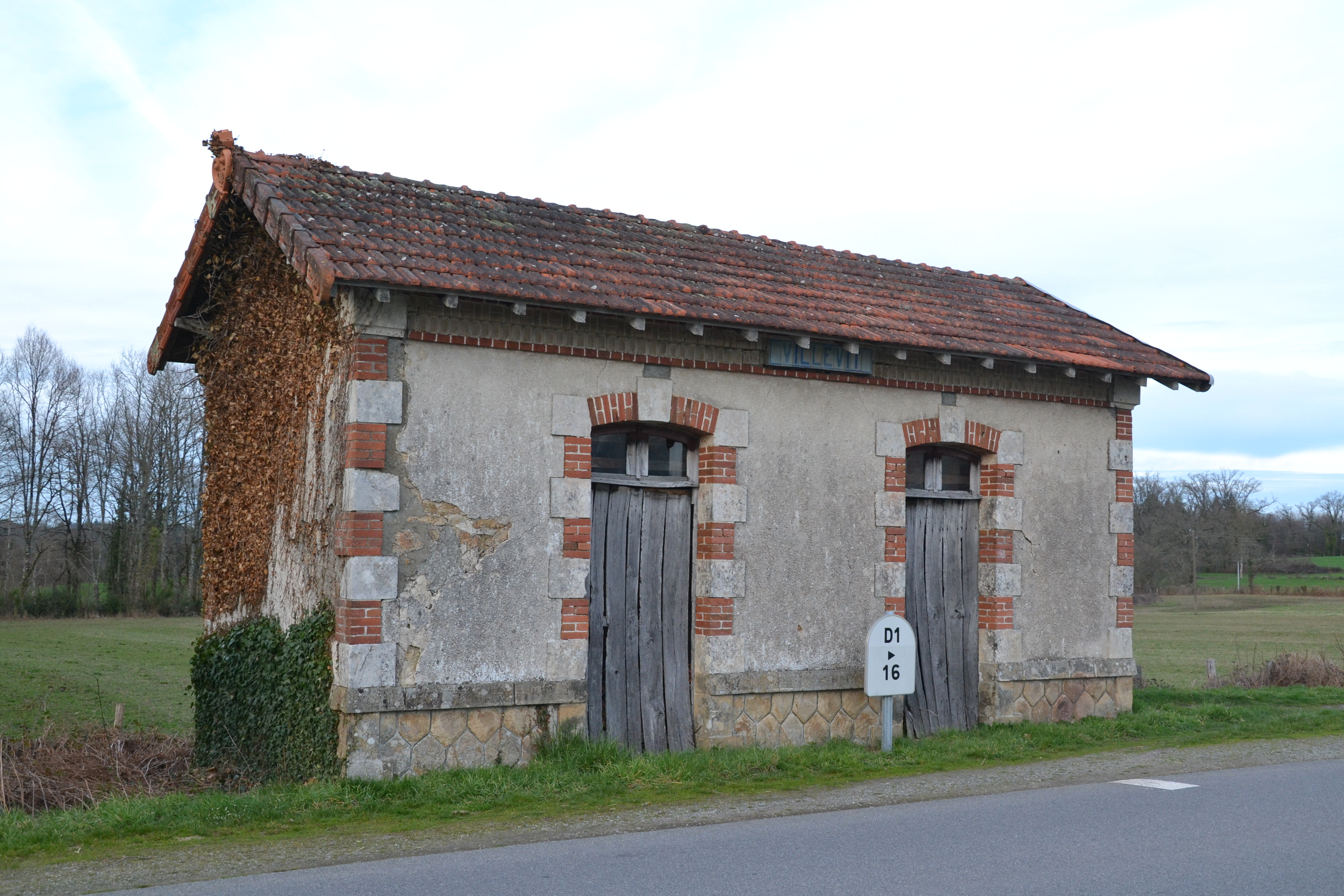 Ancienne gare des Chemins de fer départementaux de la Haute-Vienne de Villevit (commune de Rancon, Haute-Vienne, France).